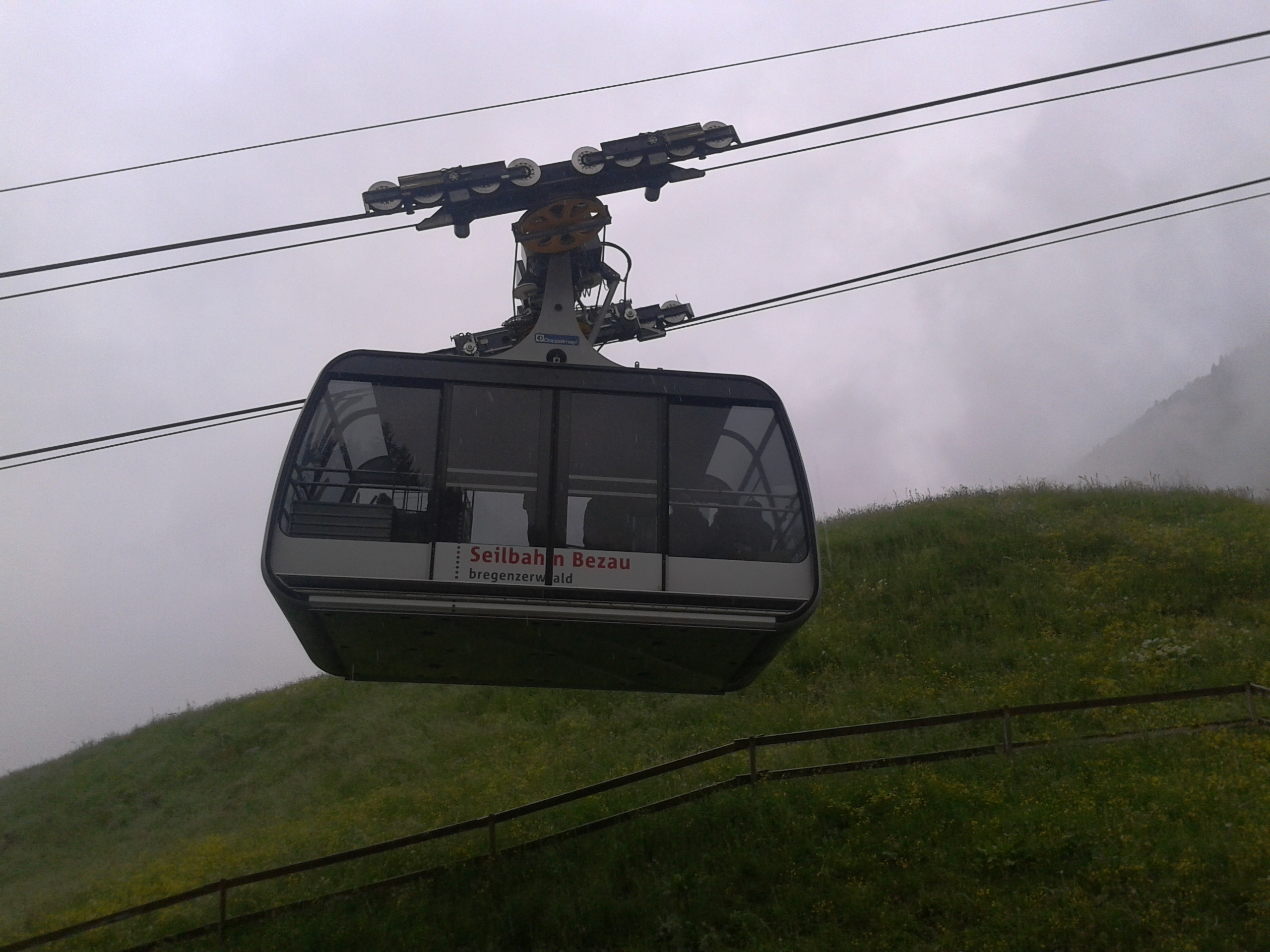 Bezauer Seilbahn (Funifor), Bezau. Erste Fahrt am Morgen (Kontrollfahrt)